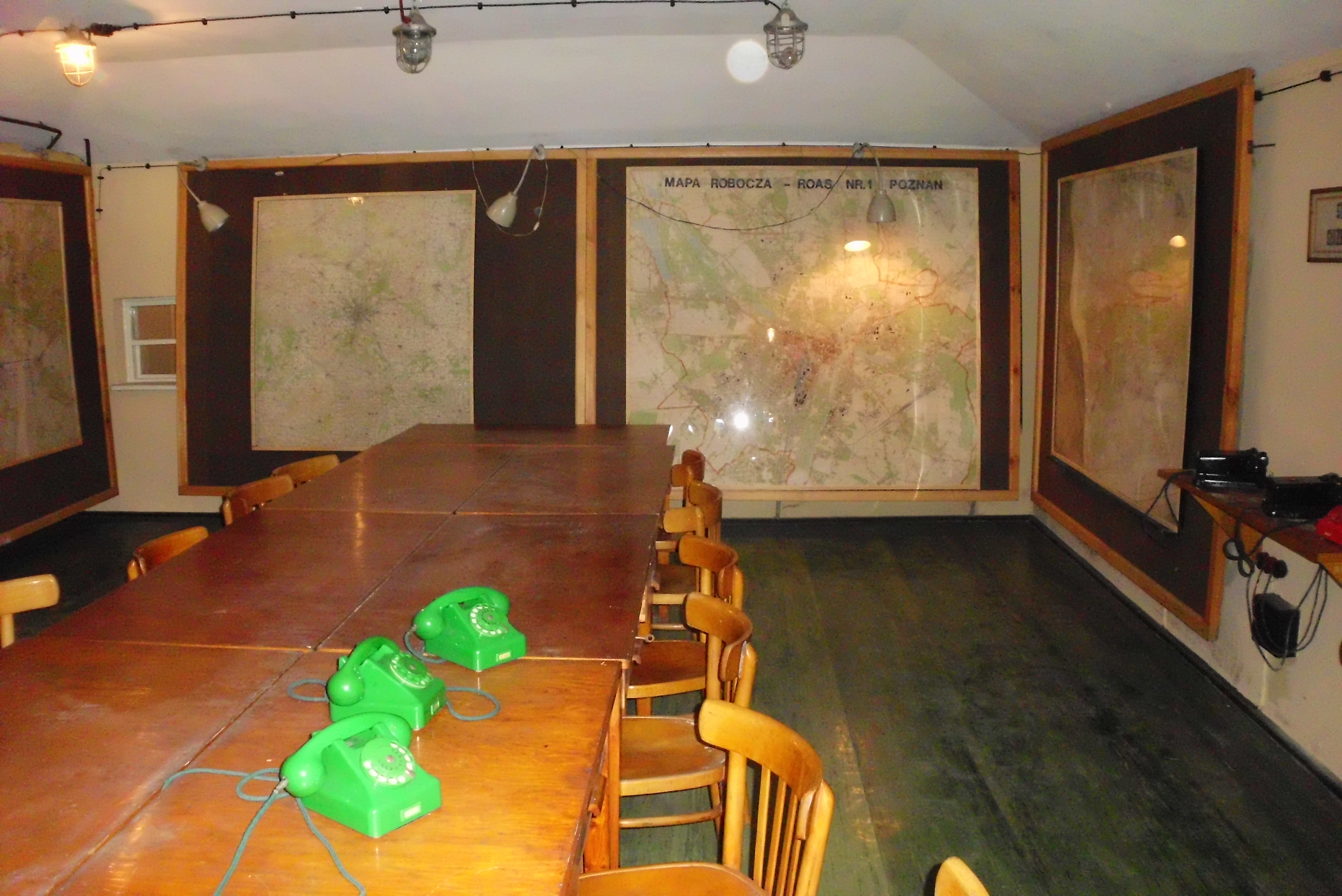 Schron dla władz miasta Poznania, ulica Słupska 62 - maj 2015